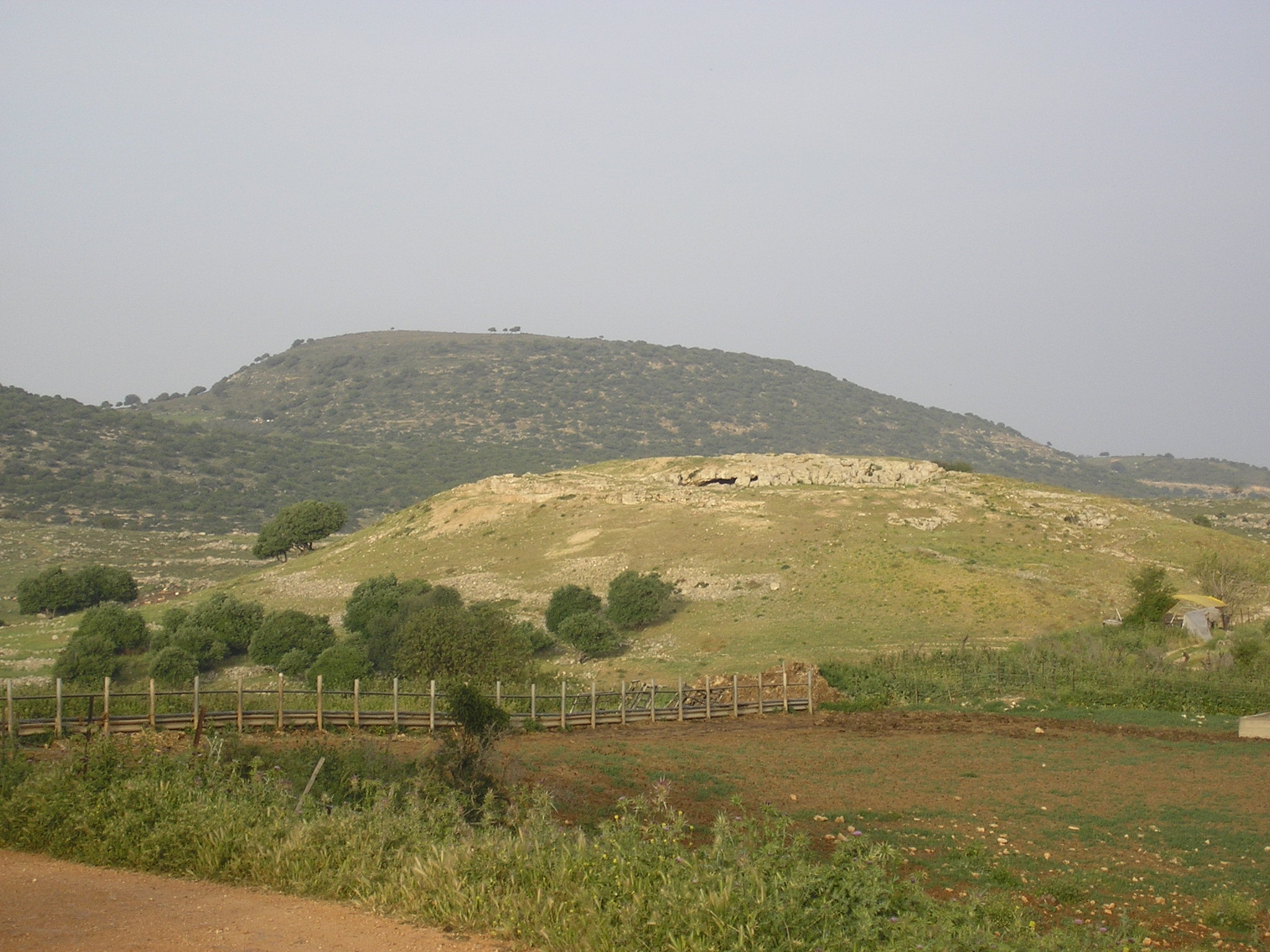 הגבעה שעליה ניצבה מצודת יודפת בימי המרד הגדול - the hill were Yodfath fortress stood during the Bar Kokba insurrection period